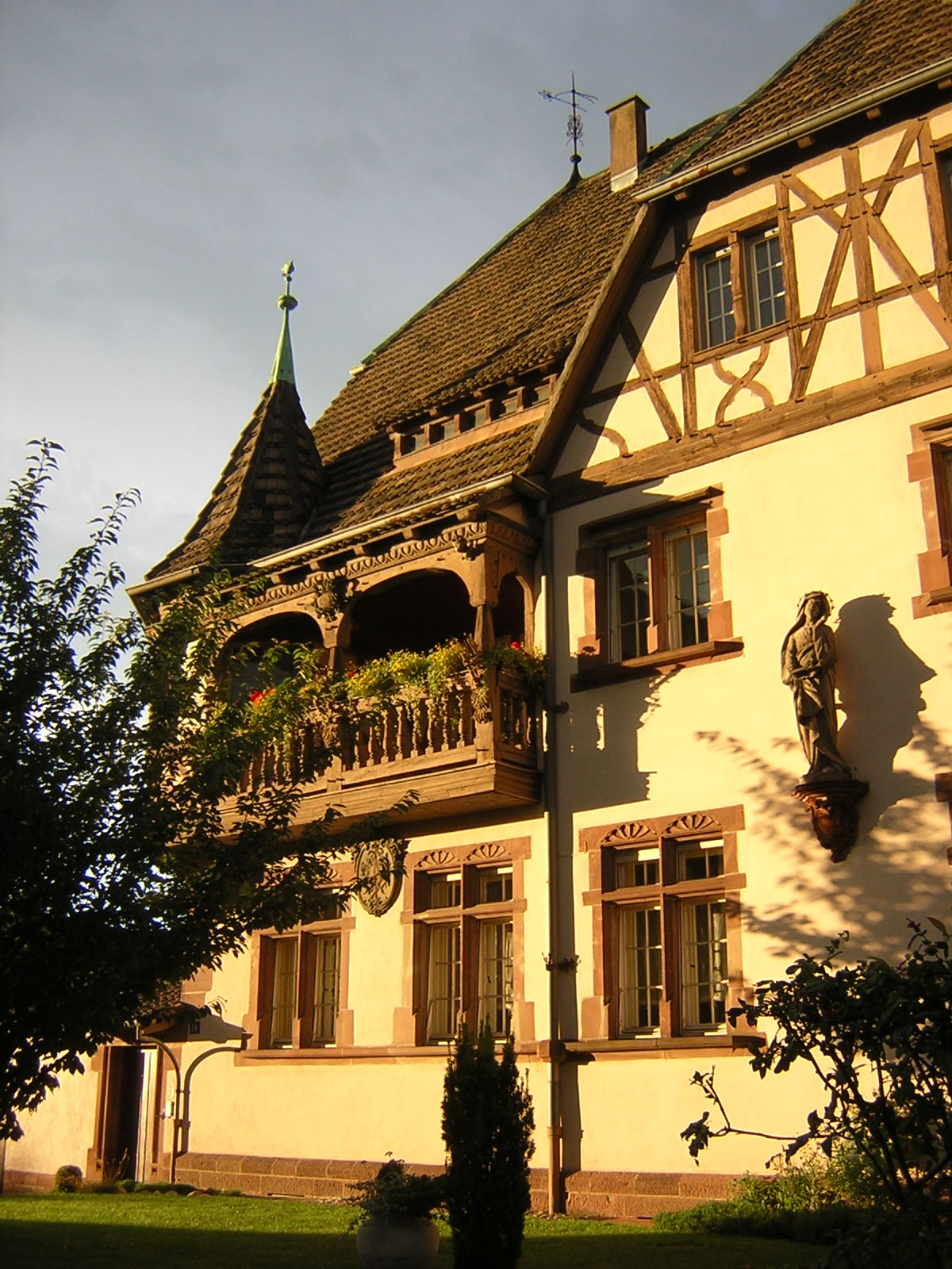 Presbytère Eglise catholique Saint-Louis, rue Jeanne d'Arc